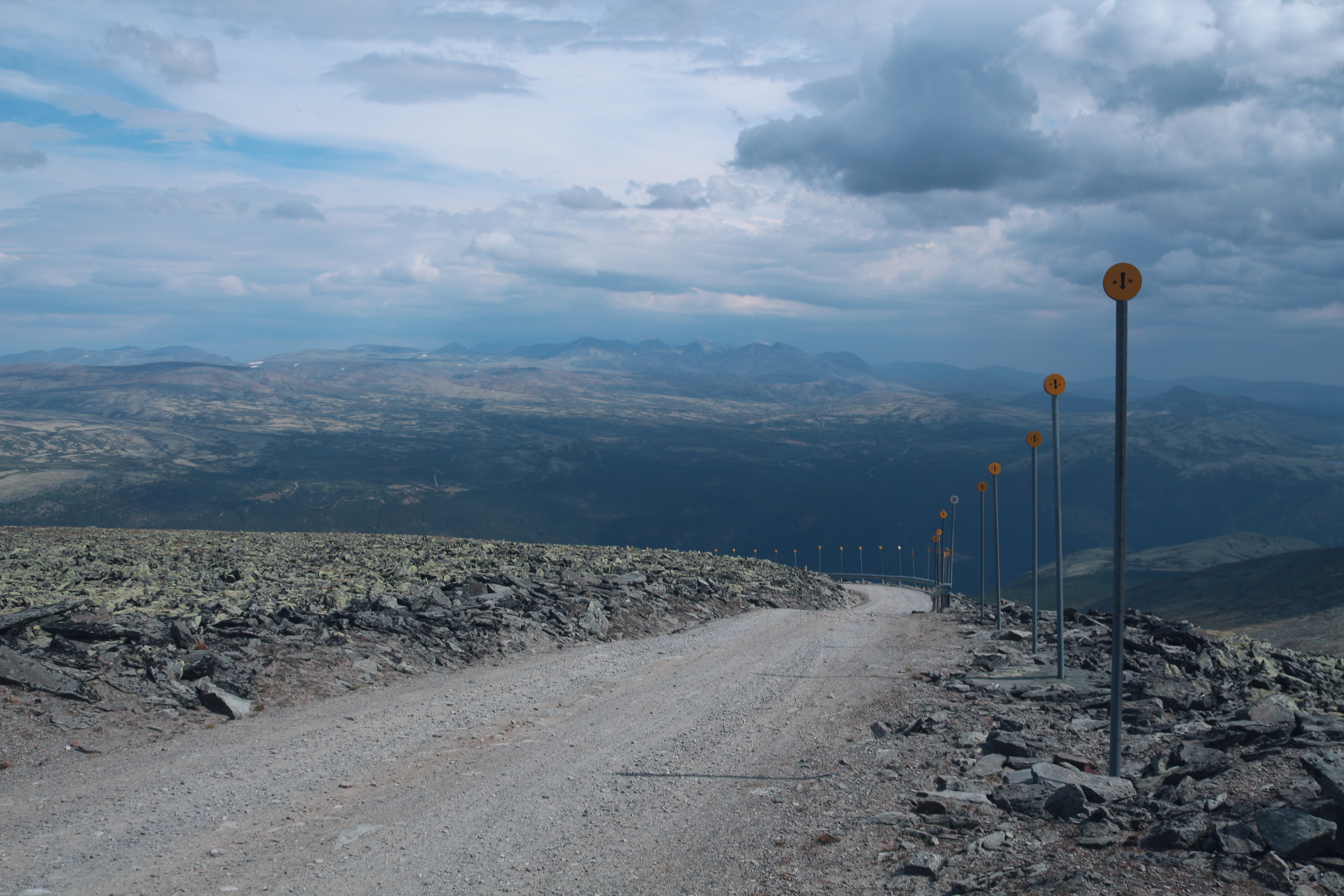 Veien ned